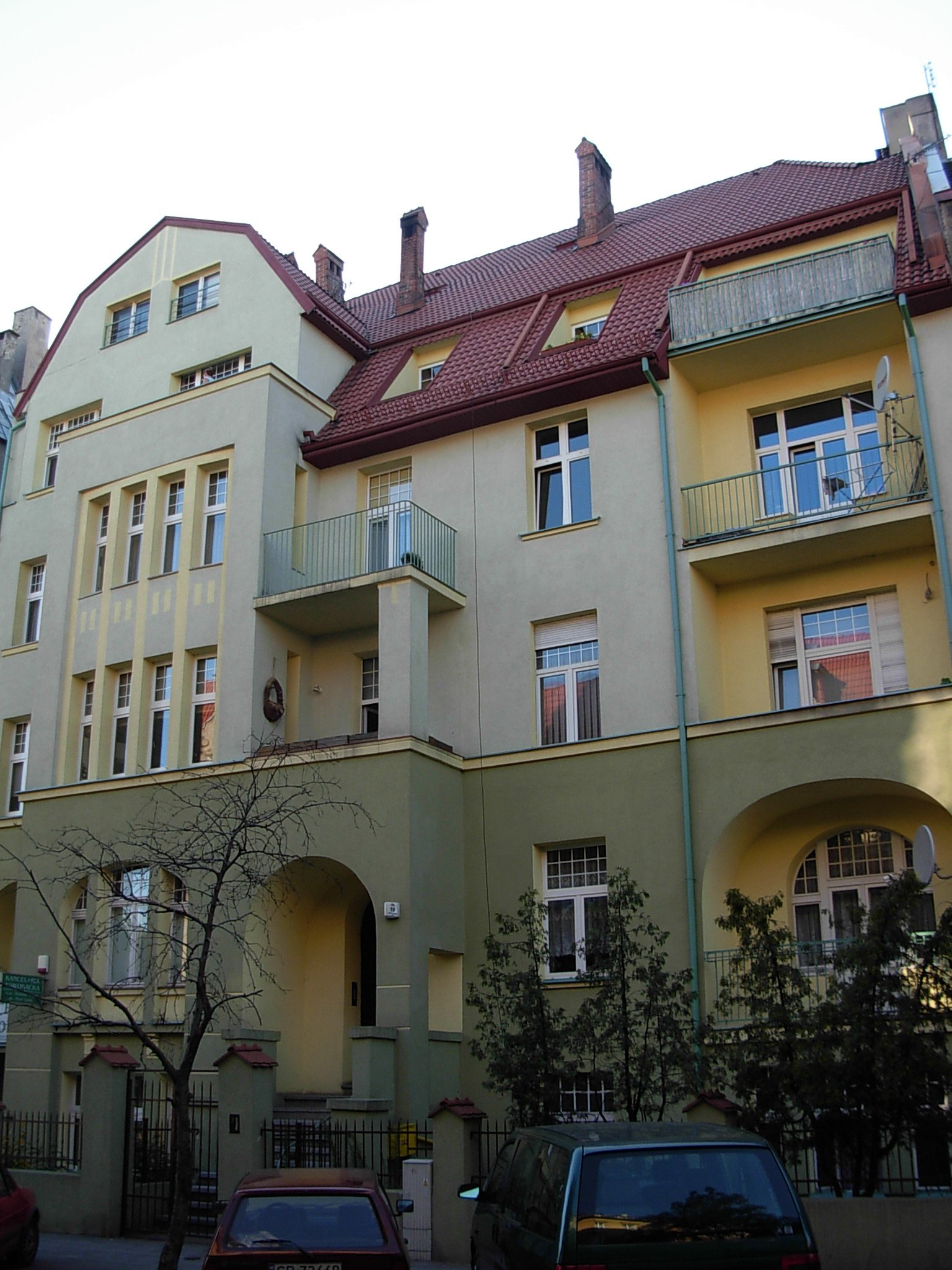 Kamienica ul. 20 stycznia 1920 19 w Bydgoszczy